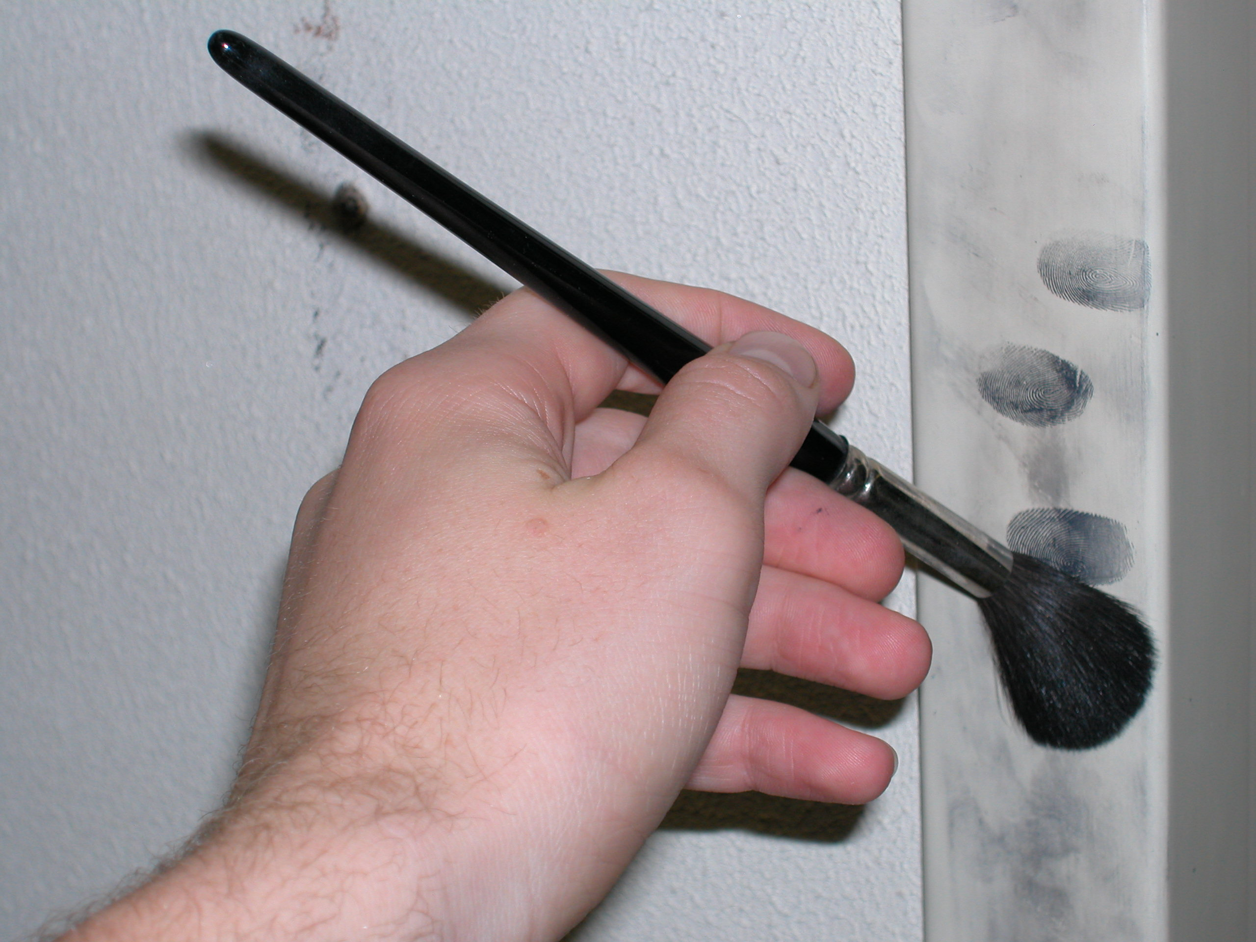 eigen werk